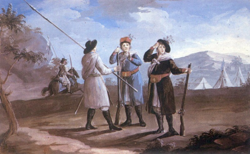 Chłopska milicja pospolitego ruszenia z 1794 roku. Gwasz z 1795 roku. Tytuł autora - Włościanie krakowscy na Pospolite Ruszenie wcasie (sic!) Powstania Narodowego Roku Pańskiego 1794. Uzbrojeni